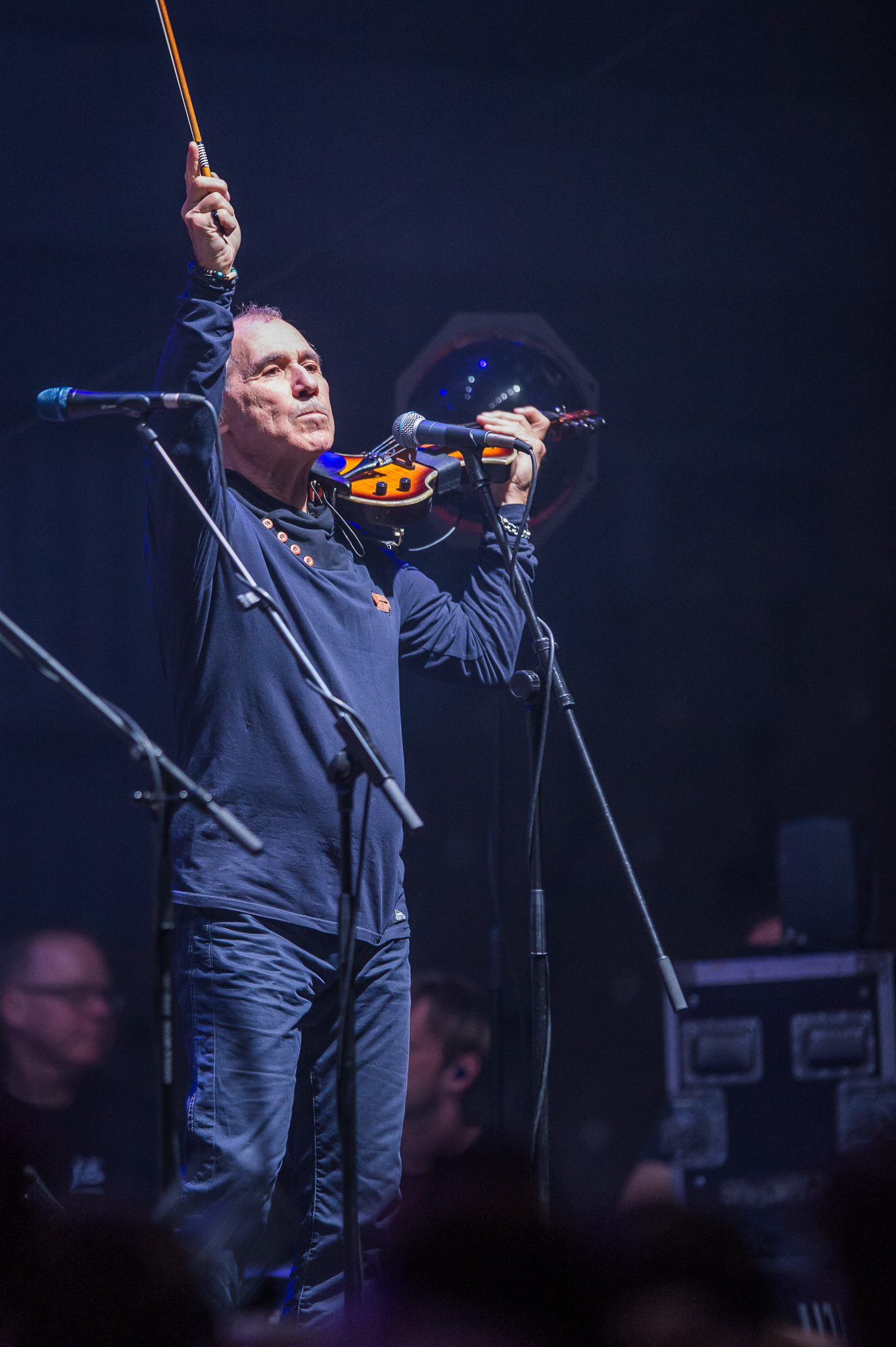 ARGO-Konzerte,City,Frankenhalle,Georgi Gogow,Konzert,Livekonzert,Livemusik,Musik,Rock Legenden 2016